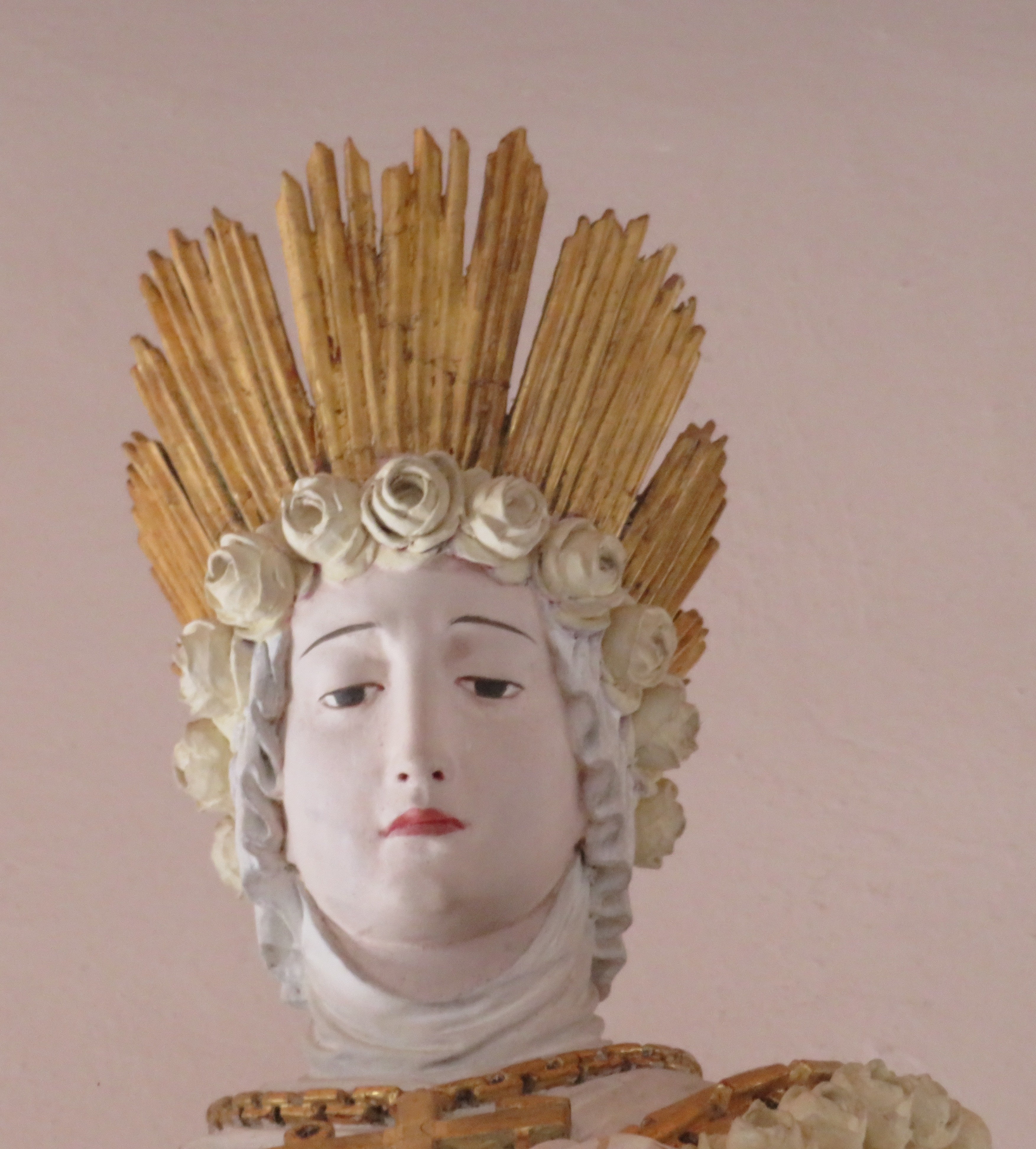 St. Oswald in Knottenried (Diepolz)